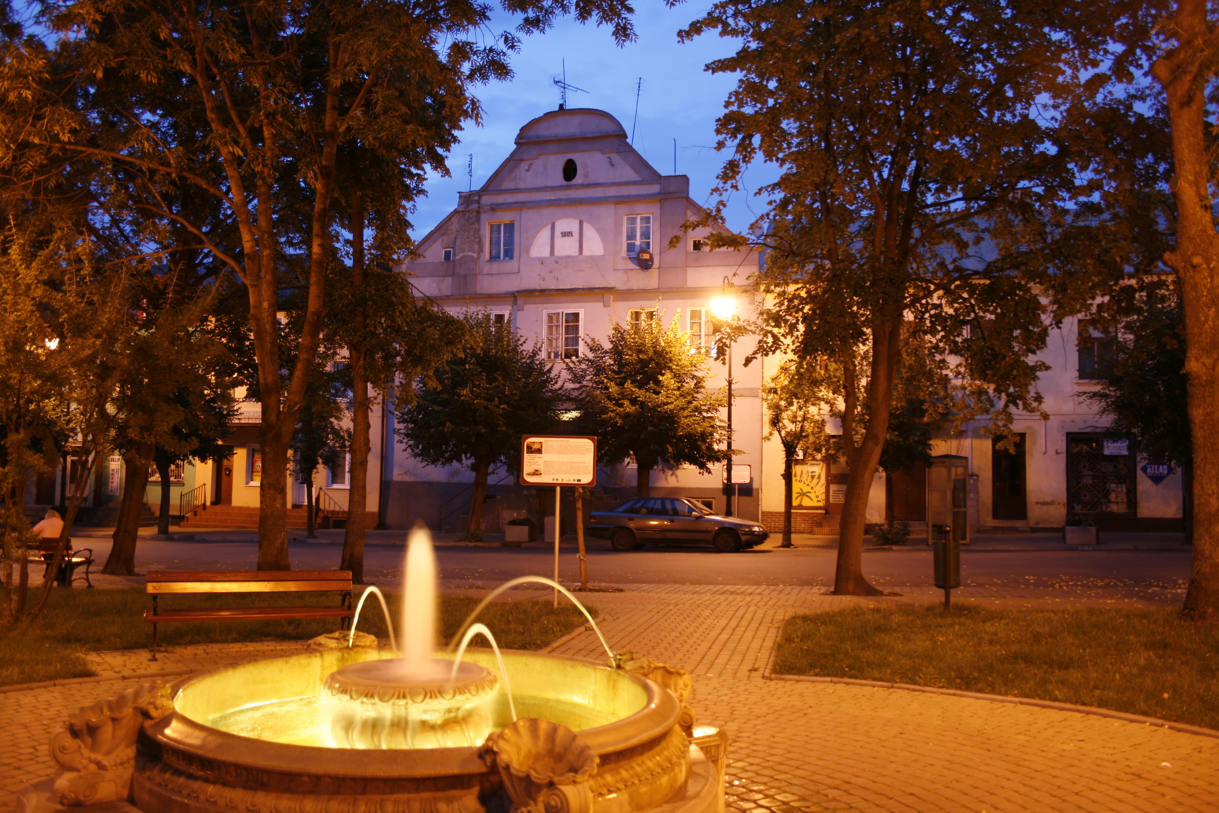 Zabytkowa kamienica przy ulicy Stary Rynek 6